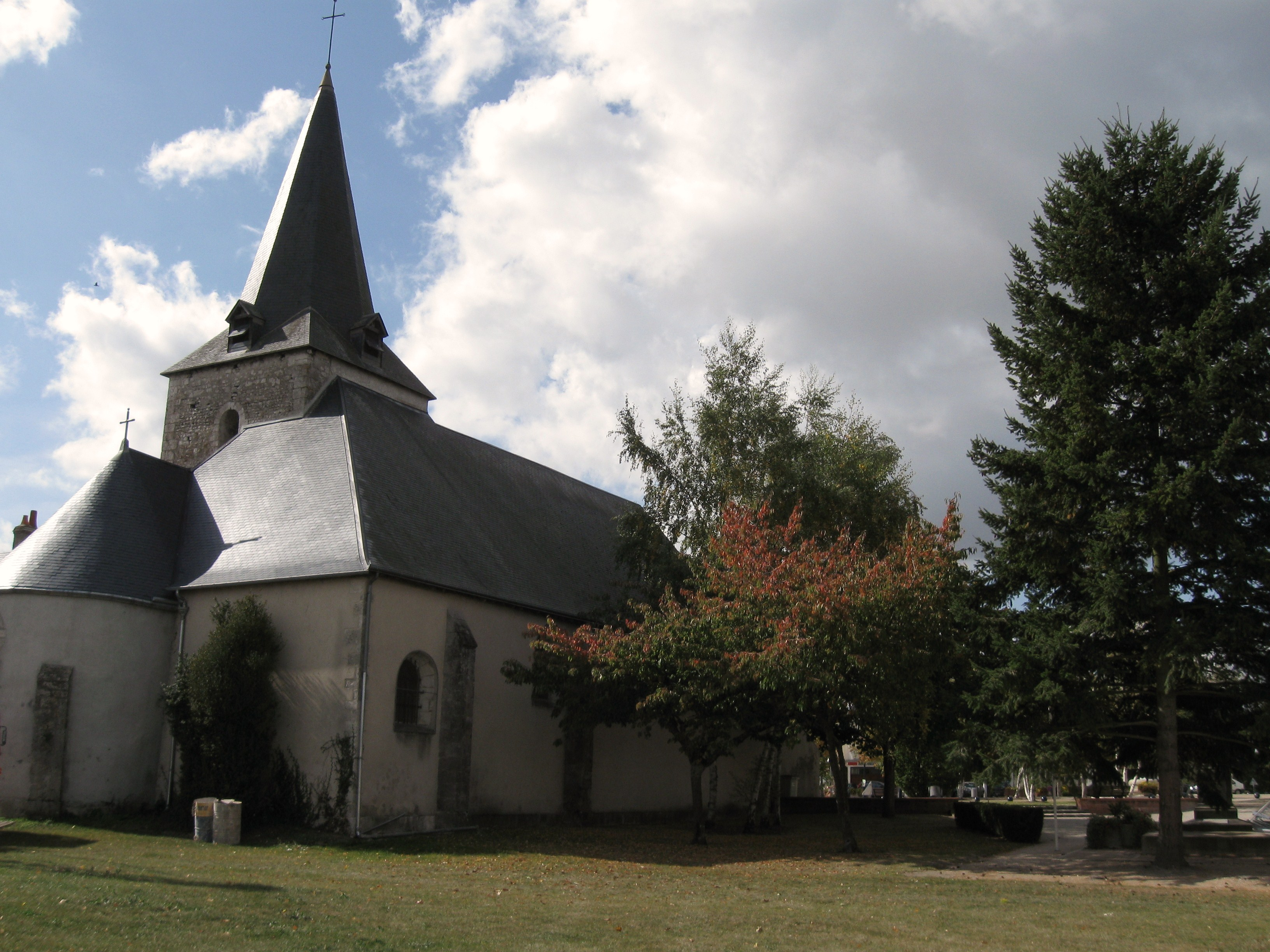 Église Notre-Dame, Semoy, Loiret, France